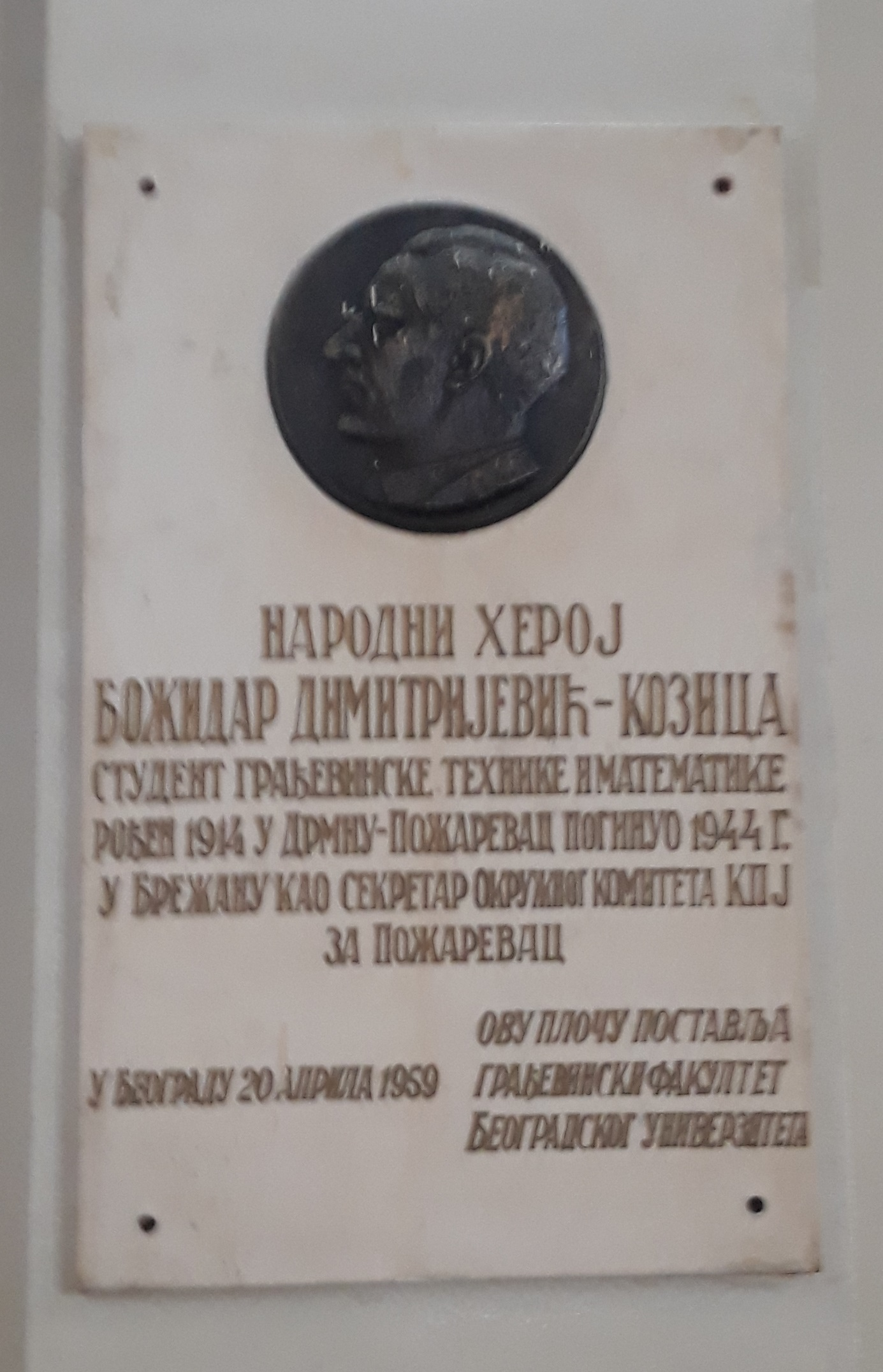 Спомен-плоча Божидару Димитријевићу Козици у Згради Техничких факултета у Београду.